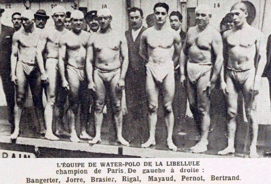 La libellule de Paris en 1922